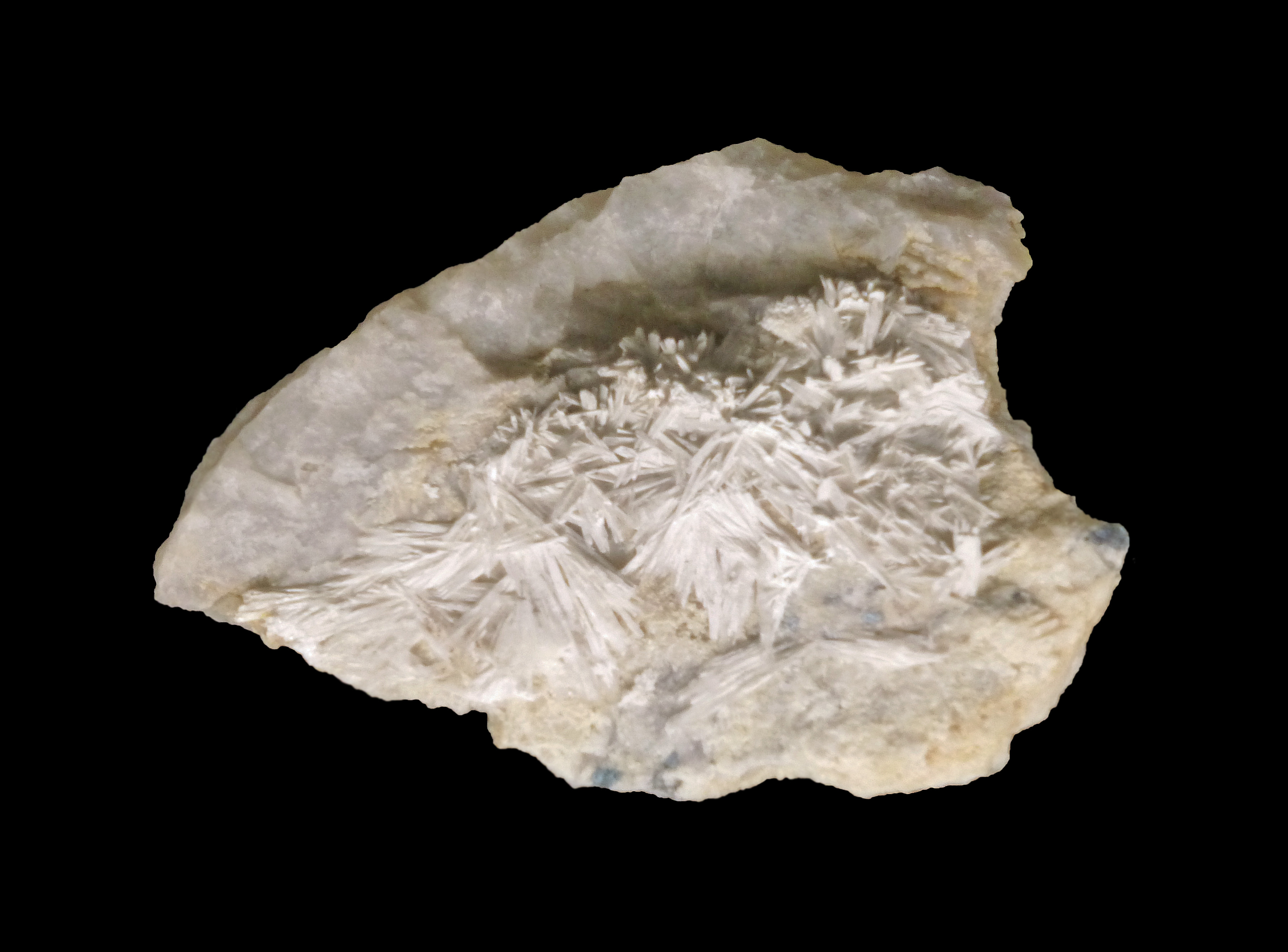 Pharmacolite en longues aiguilles (Mine Gabe Gottes, Neuenberg, Sainte-Marie-aux-Mines, Haut-Rhin). Musée de minéralogie de Strasbourg